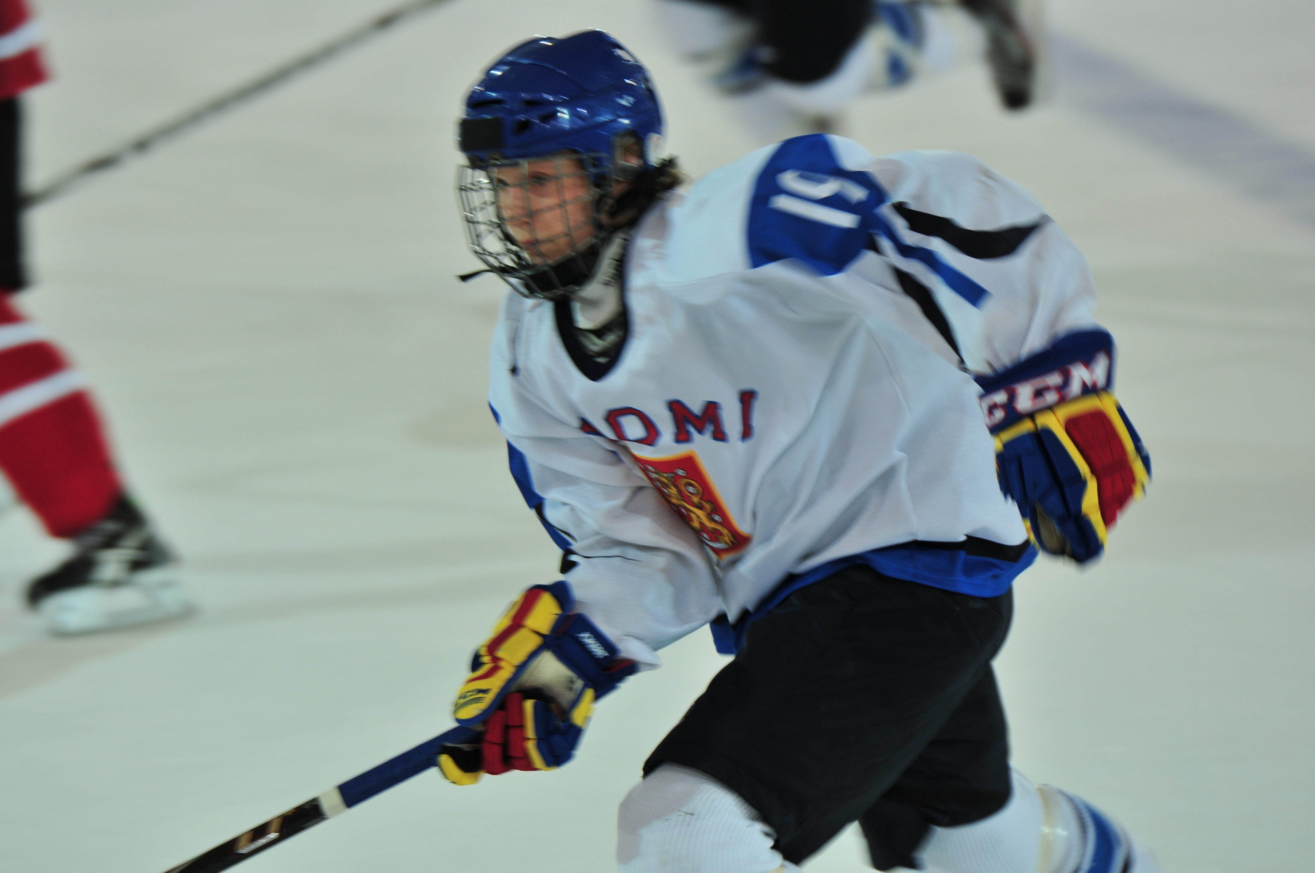 1. Jugendolympiade 2012 Innsbruck